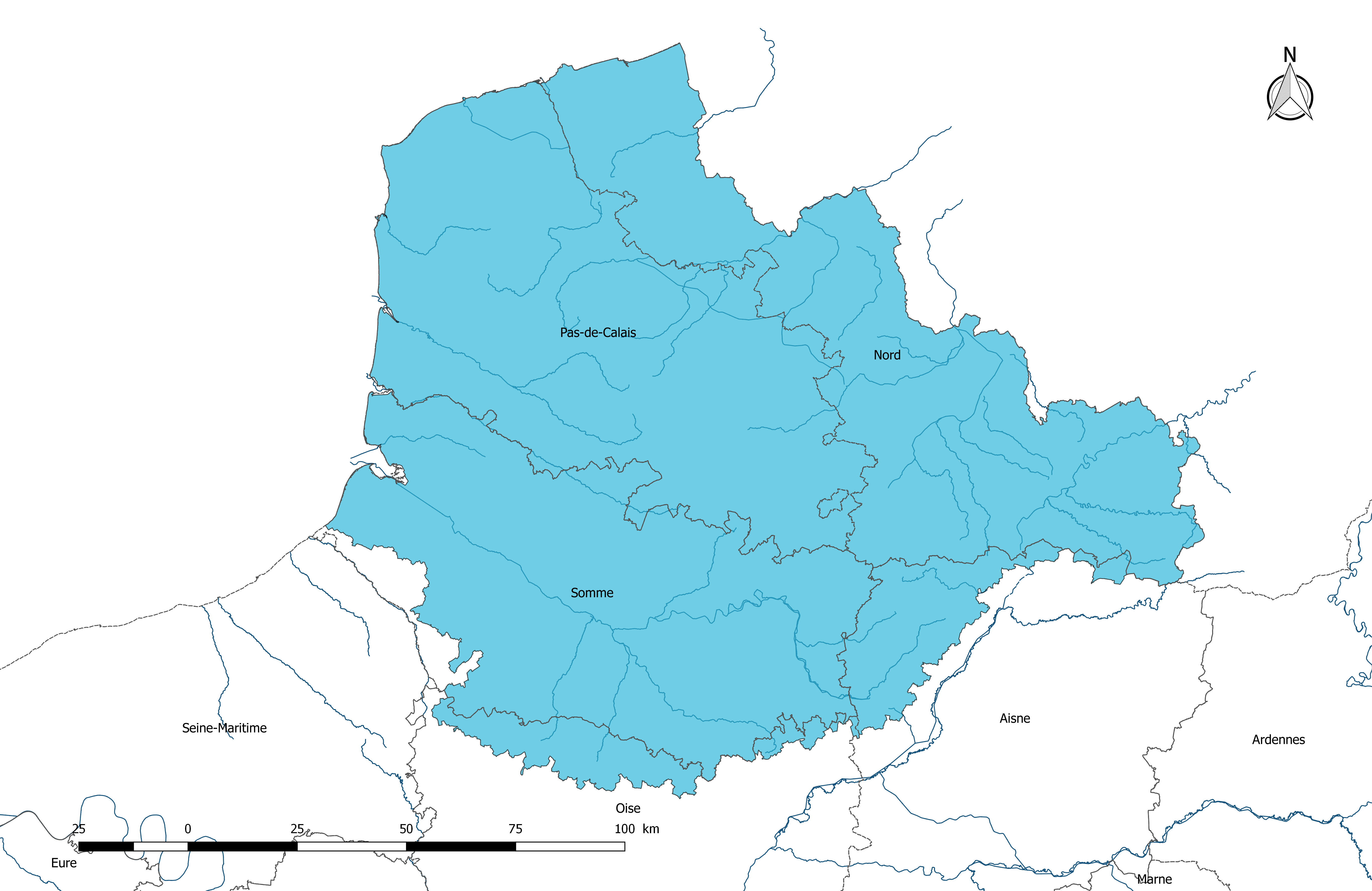 Carte de la circonscription de bassin Artois-Picardie en France, avec les départements qui la composent.